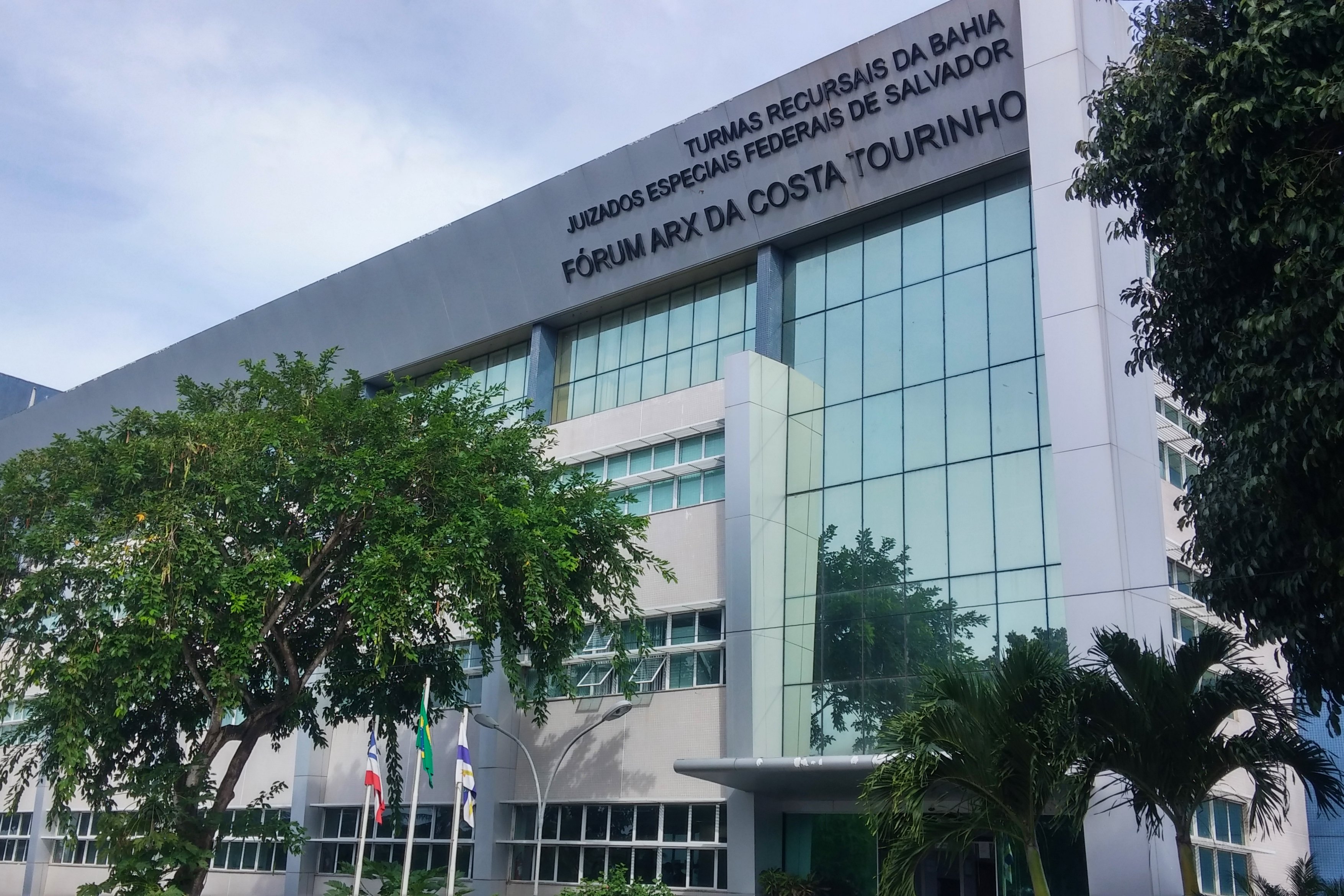 Português do Brasil: Fórum Arx da Costa Tourinho, prédio dos Juizados Especiais Federais de Salvador e das Turmas Recursais do Sistema de Juizados Especiais Federais da Seção Judiciária da Bahia. Localizado no Centro Administrativo da Bahia - Salvador, Bahia.